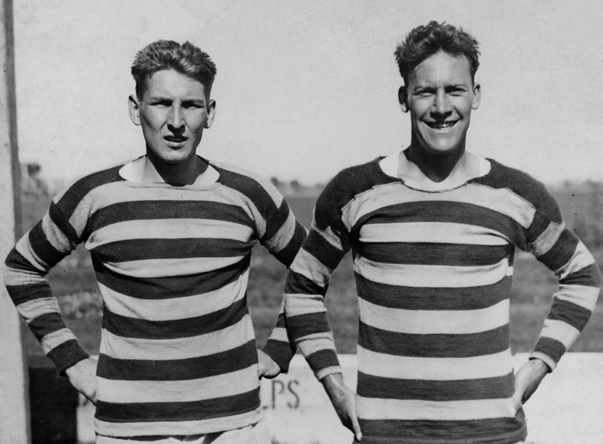 Sport, Olympische Spelen Amsterdam 1928, Roeien: Opname van de Canadese roeiers J.S. Guest en Joseph Joe Wright winnaars van de zilveren medaille op het onderdeel Dubbel Twee.